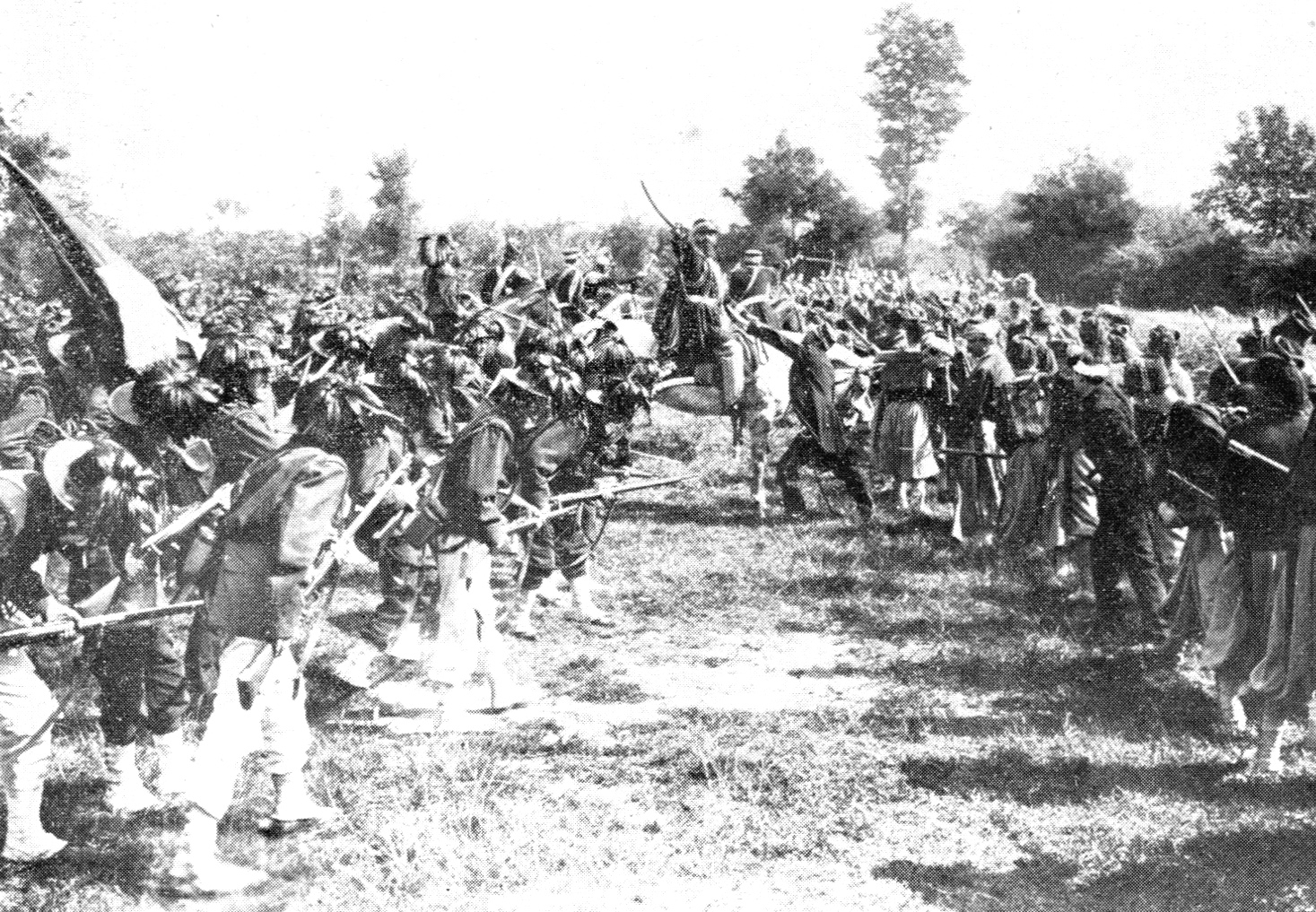 Nozze d'oro (maggi 1911) - foto scena soldati piemontesi